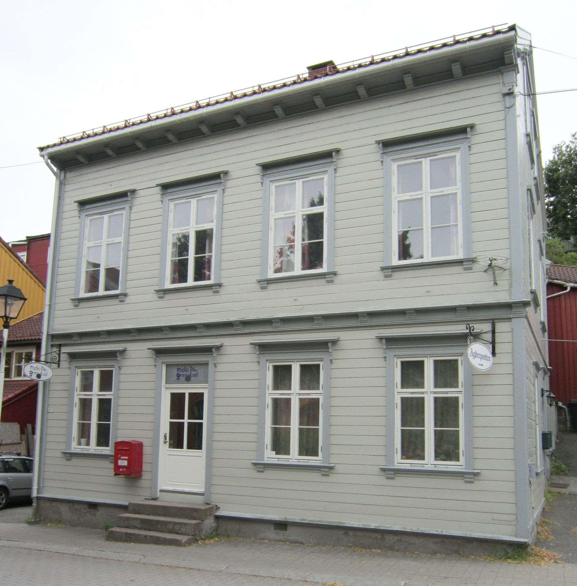 Radio Grimstads lokaler i Grimstad